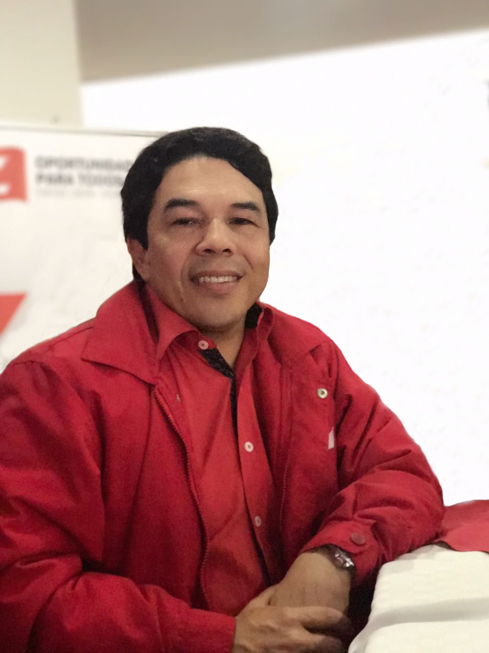 OSCAR HURTADO FOTOS REPRESENTANTE (1)